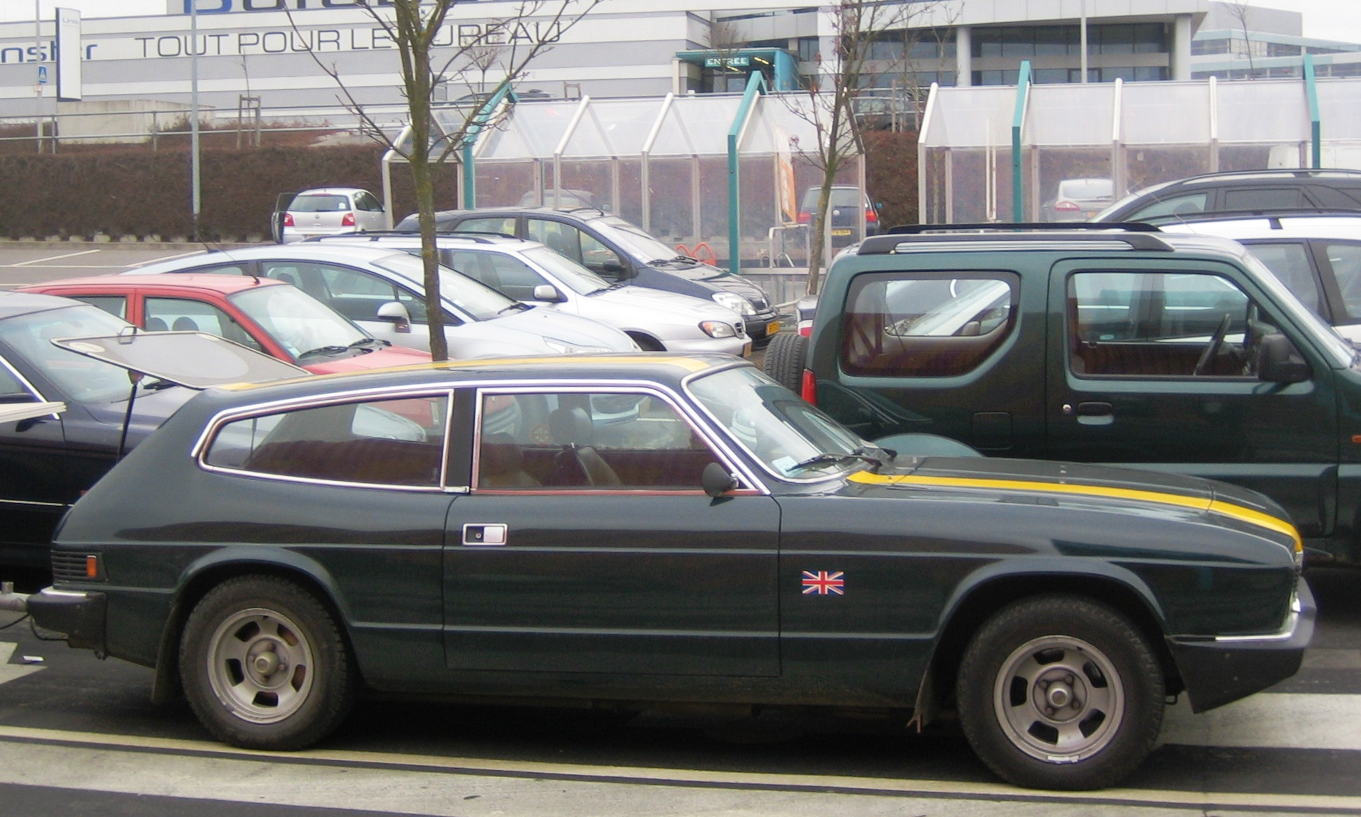 Reliant Scimitar GTE ca 1978